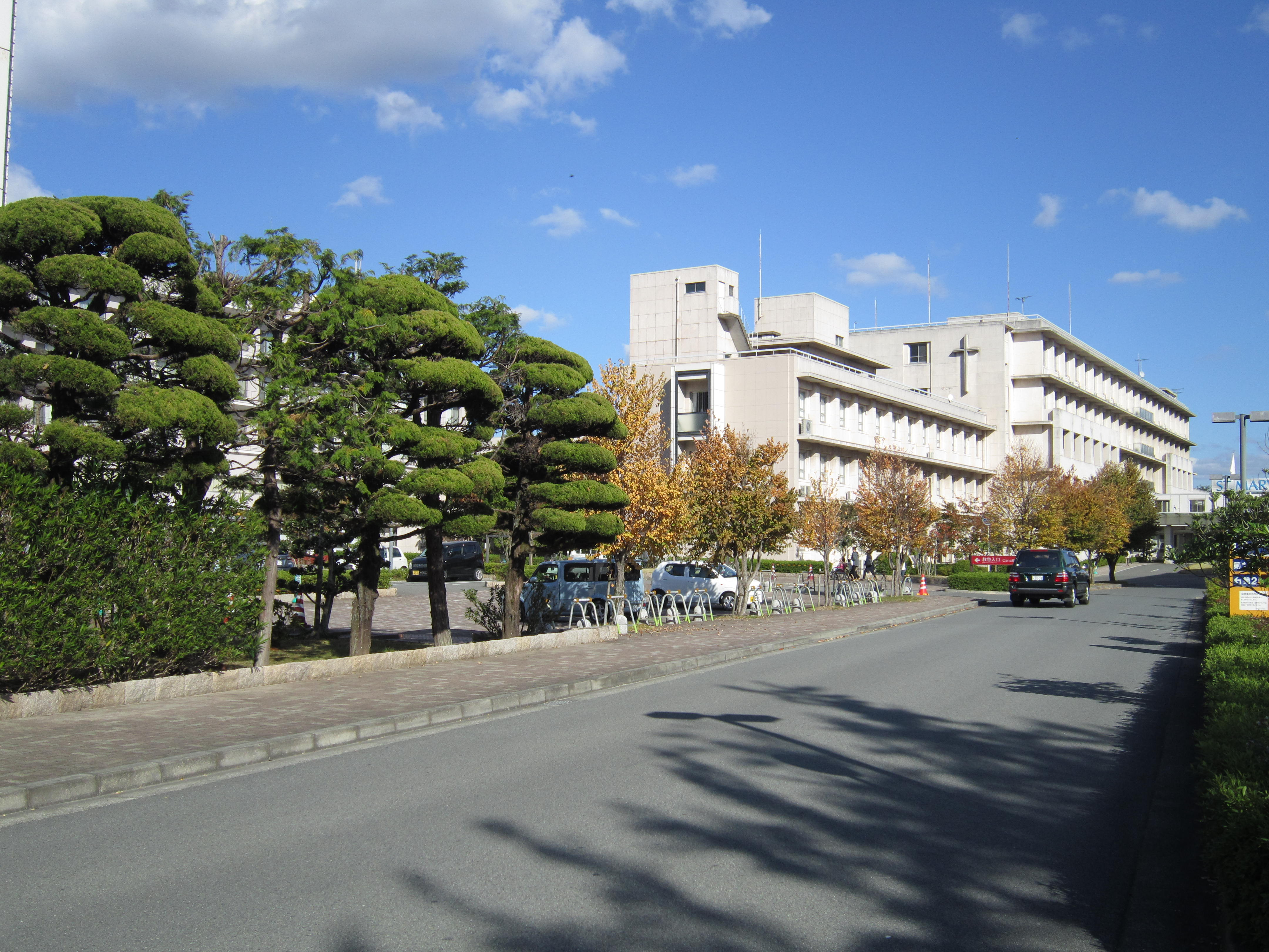 国道312号線そばにある聖マリア病院。